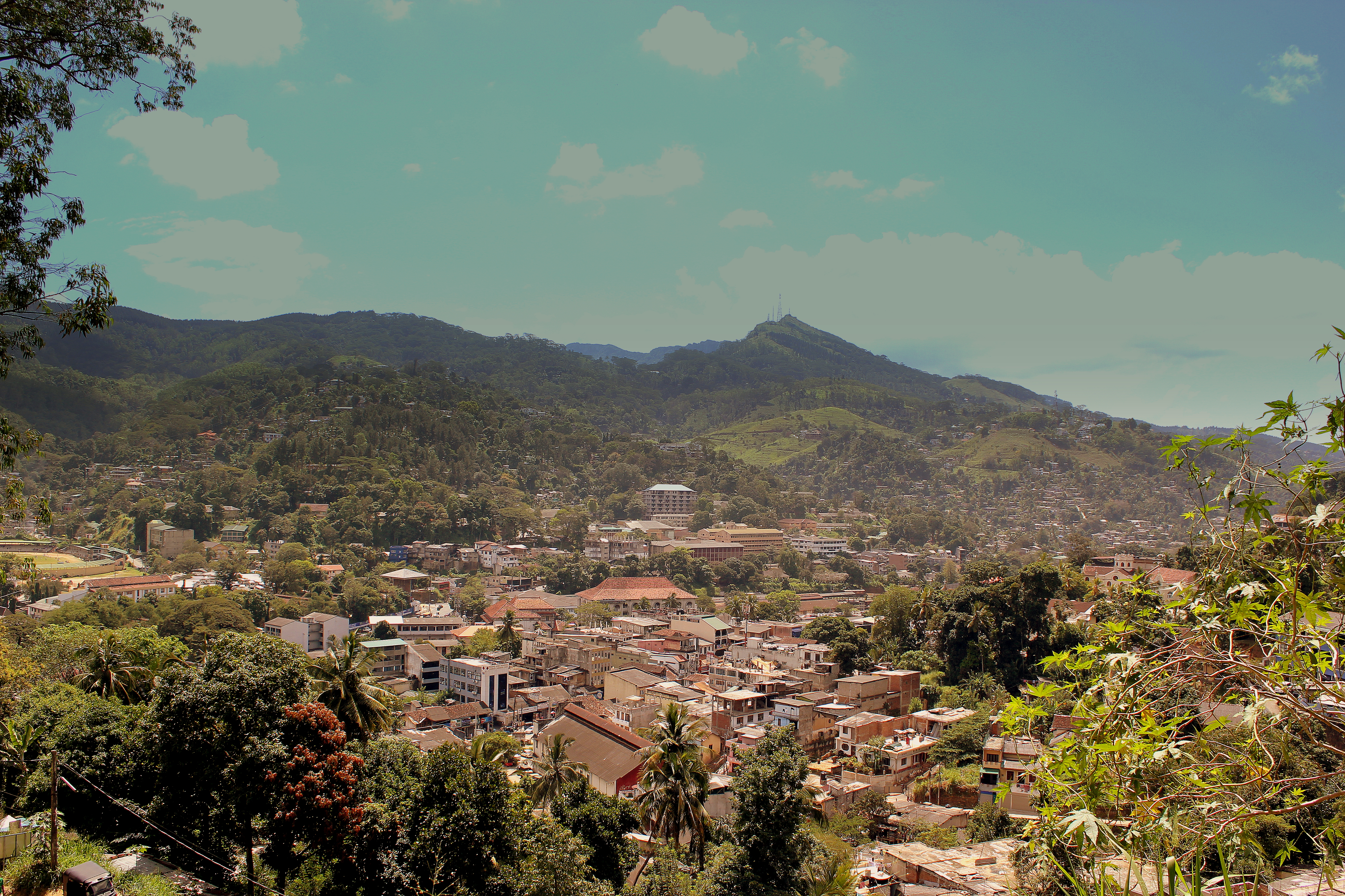 KANDY SRI LANKA JAN 2013